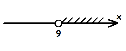 x ir lielāks par deviņi